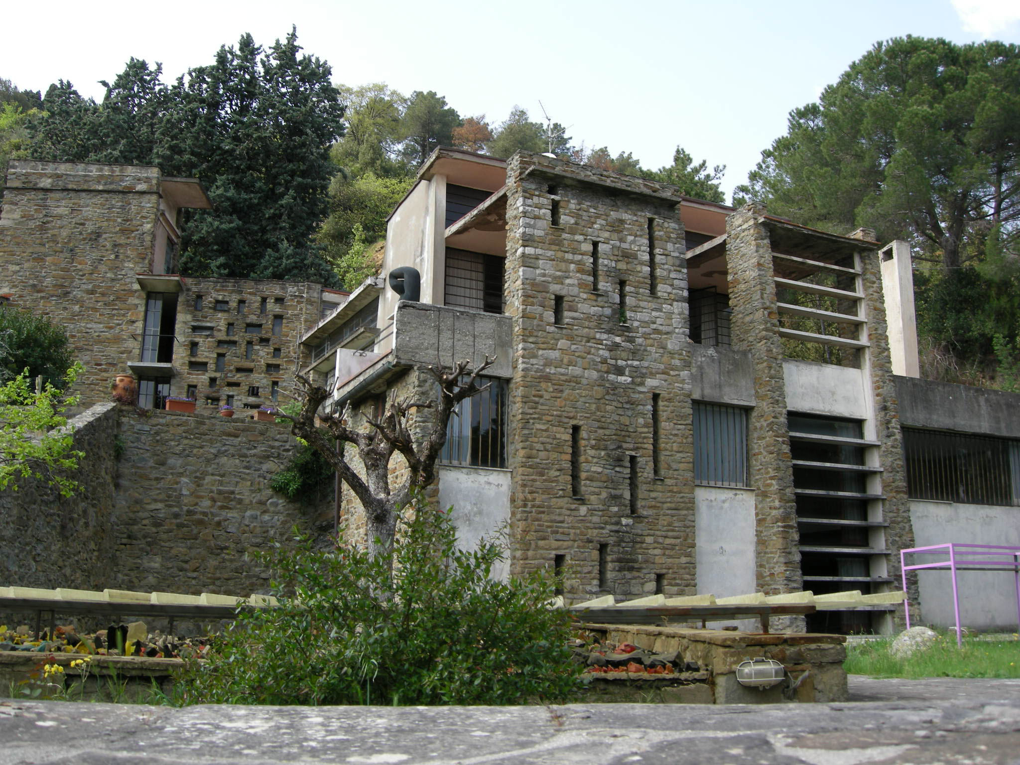 Casa-studio di Leonardo Ricci 04